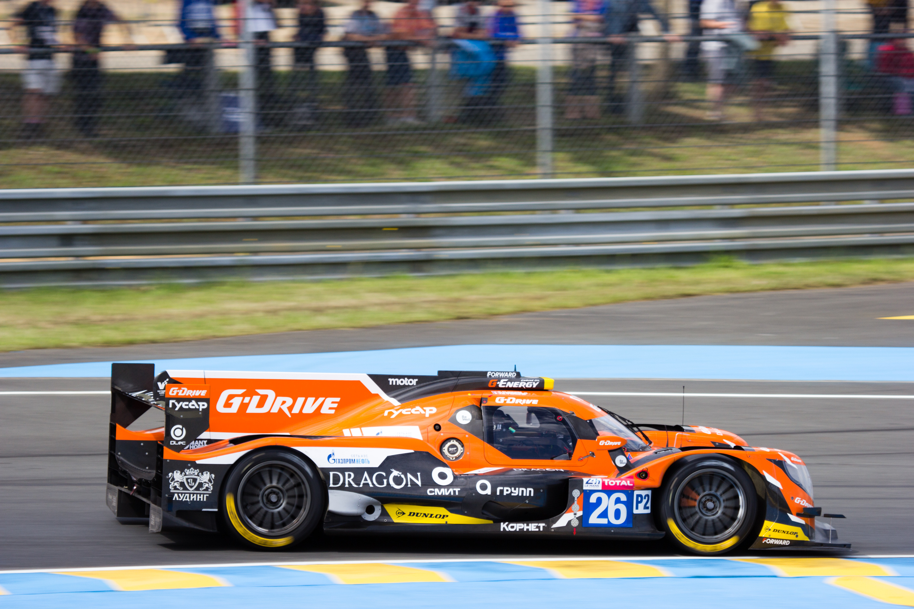 Roman Rusinov - Andrea Pizzitola - Jean-Eric Vergne